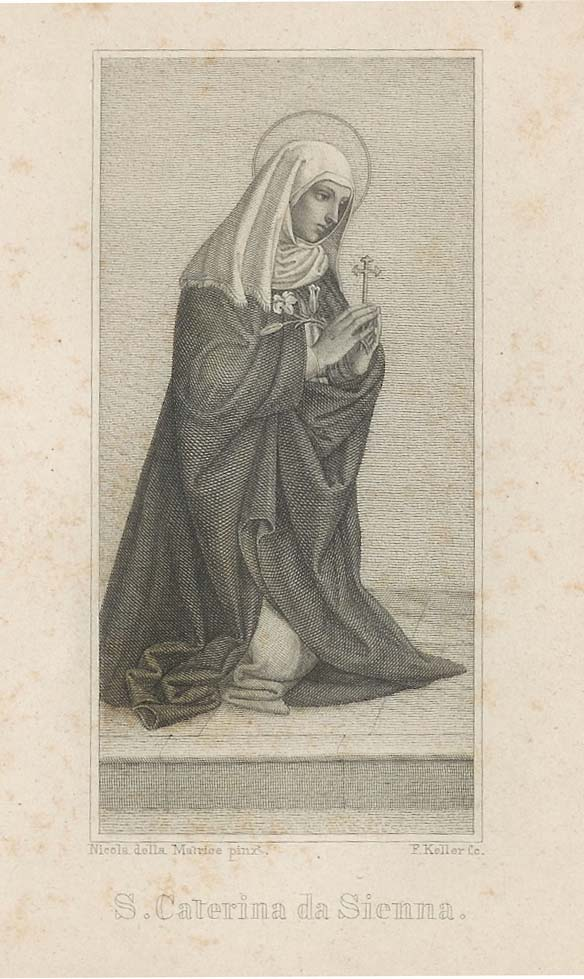 Catharina van Siena (prent is uit 1860). Ik heb dit uit mijn eigen bezit gefotografeerd.